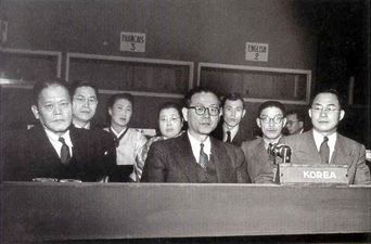 1948.12 UN 총회 대한민국 대표단